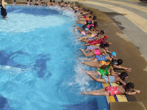 สระว่ายน้ำ โรงเรียนอรพินพิทยา